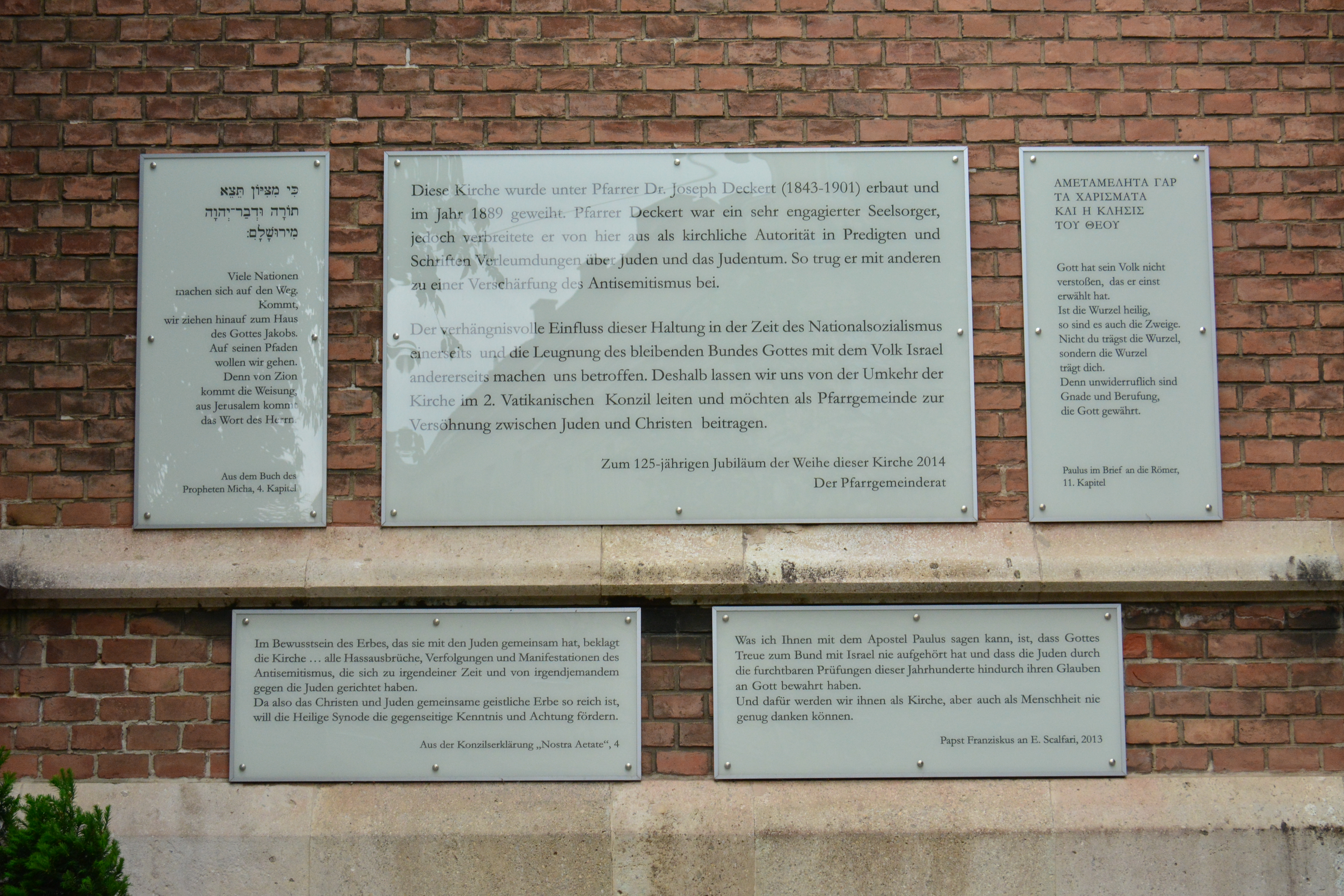 Gedenktafel Christlicher Antisemitismus (Wien, Gentzgasse 140, Kirche)